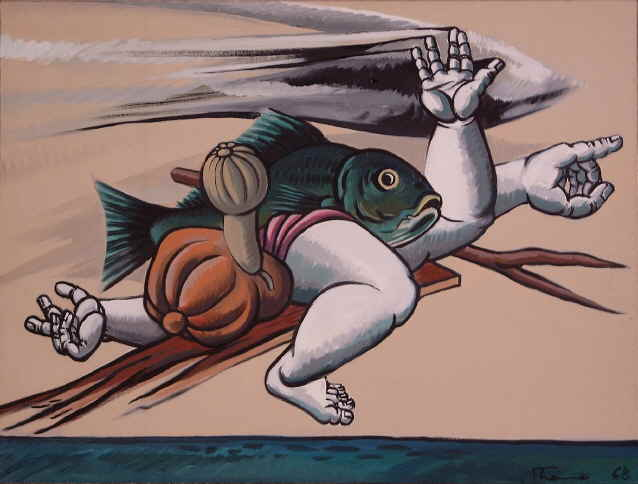 Fliegendes Brett mit grünem Fisch 1968 Dispersionsfarbe - Leinwand 80 x 105